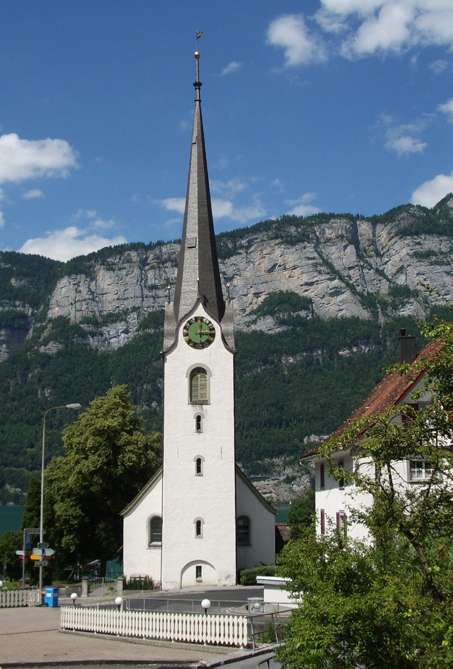 Kirche Mühlehorn GL, Schweiz